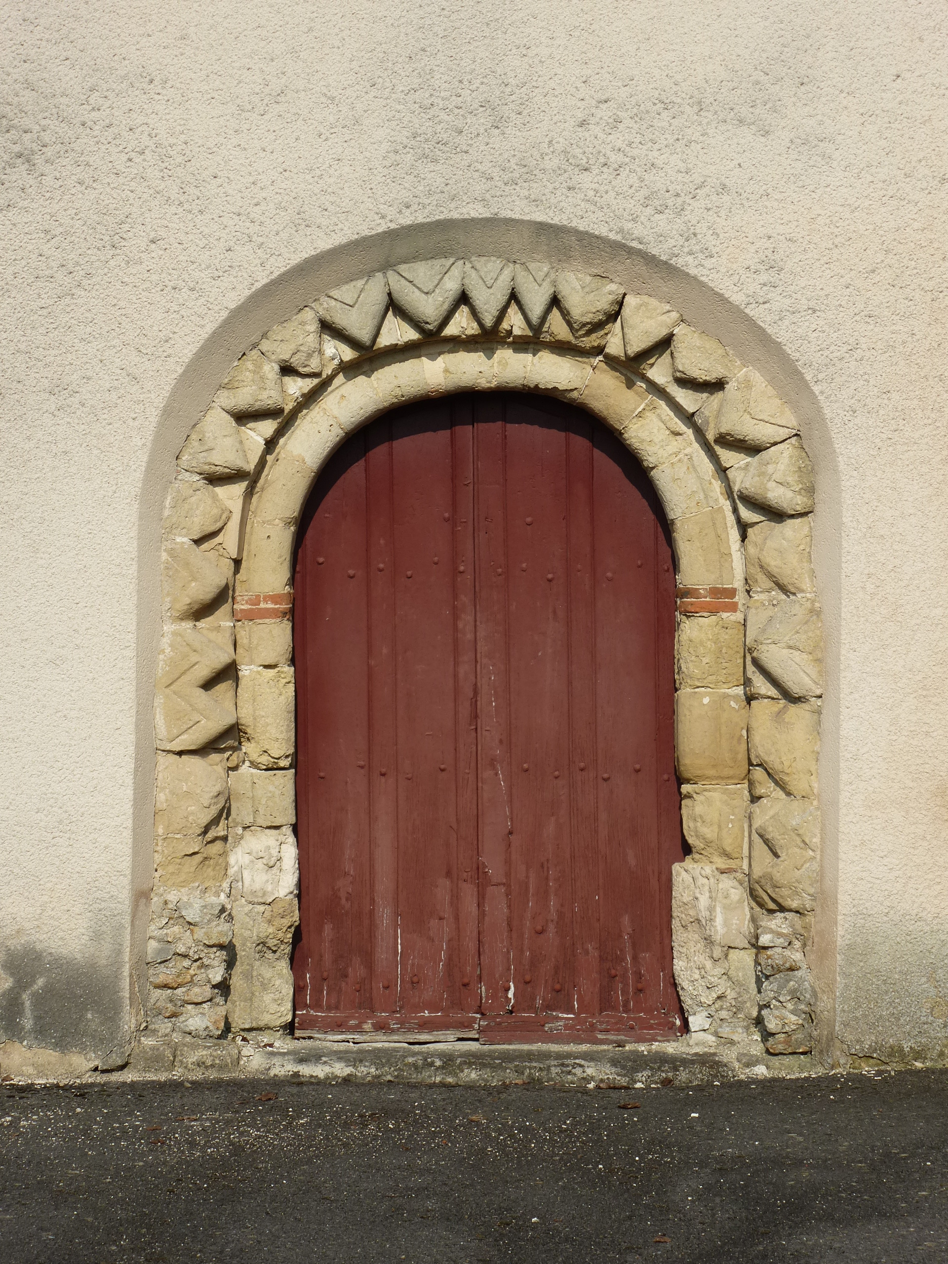 Portail de style roman - Église Saint-Bald de Pavant. (département de l'Aisne , région Picardie).